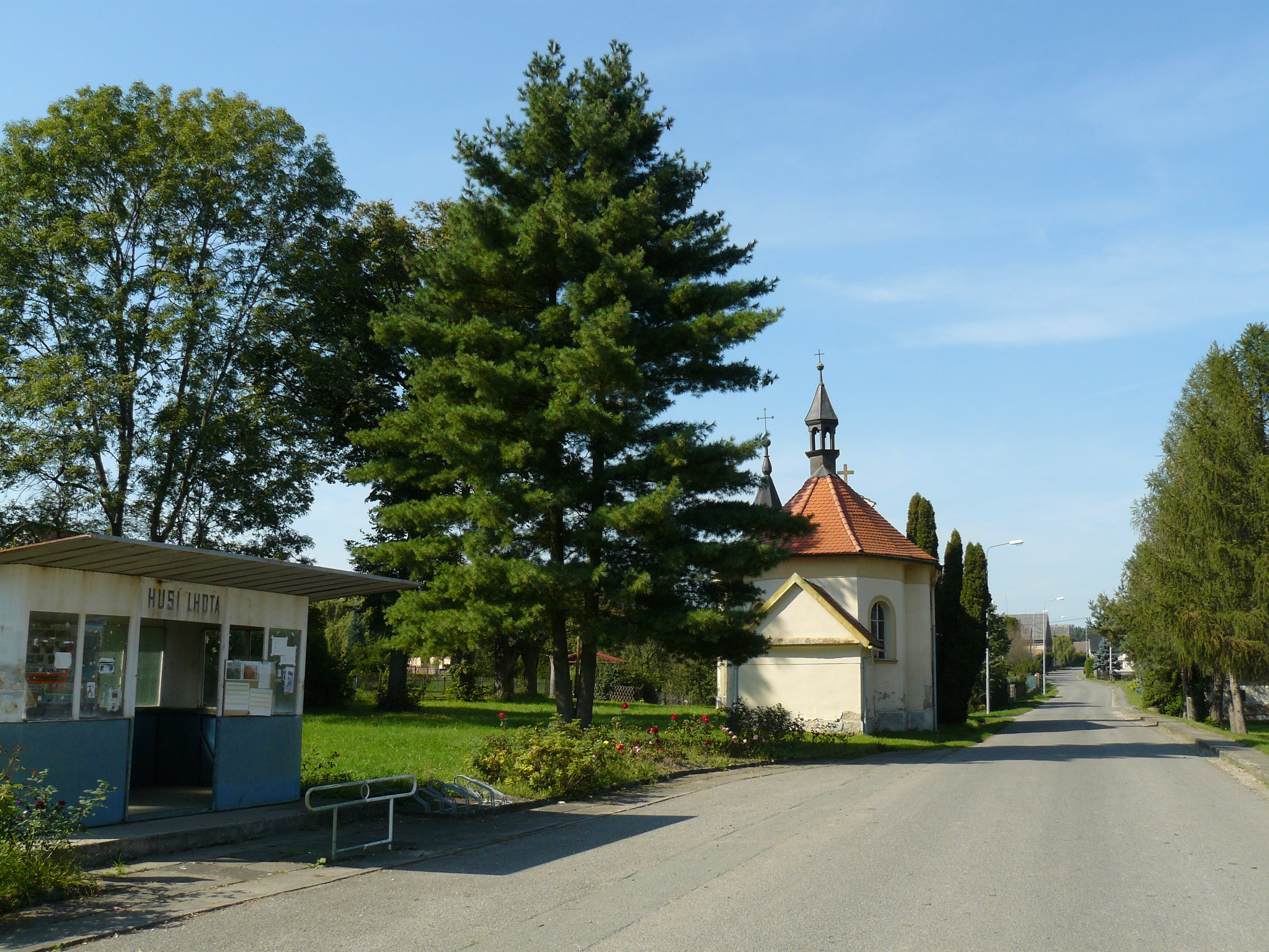 Husí Lhota